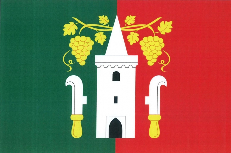 vlajka, Suchohrdly u Miroslavi, okres Znojmo